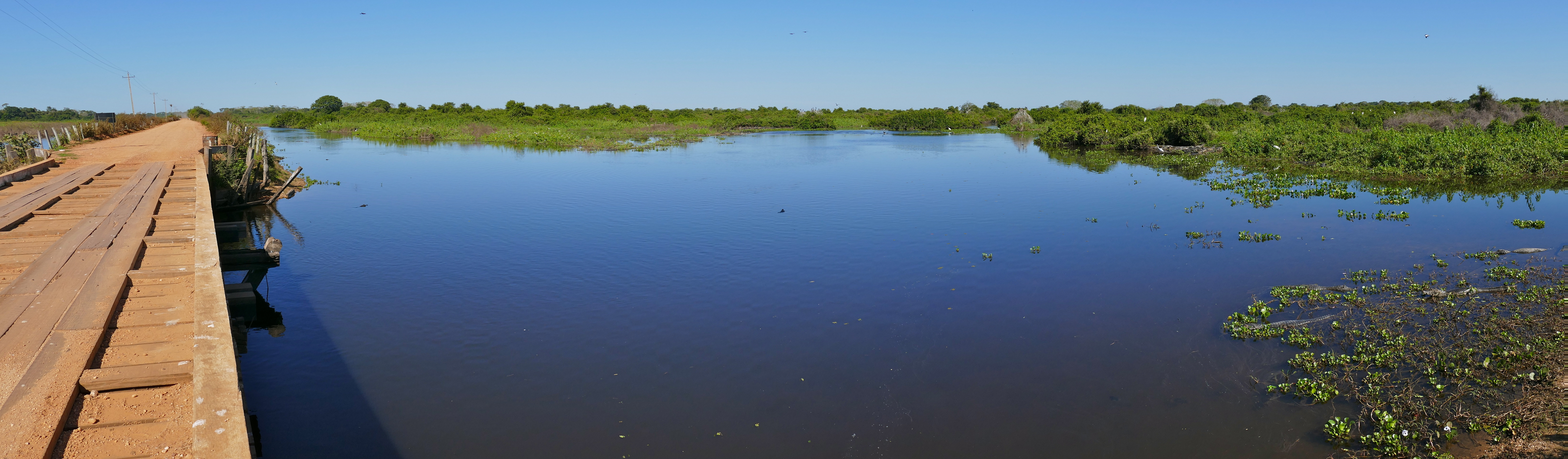 Transpantaneira, Poconé, Mato Grosso, BRAZIL